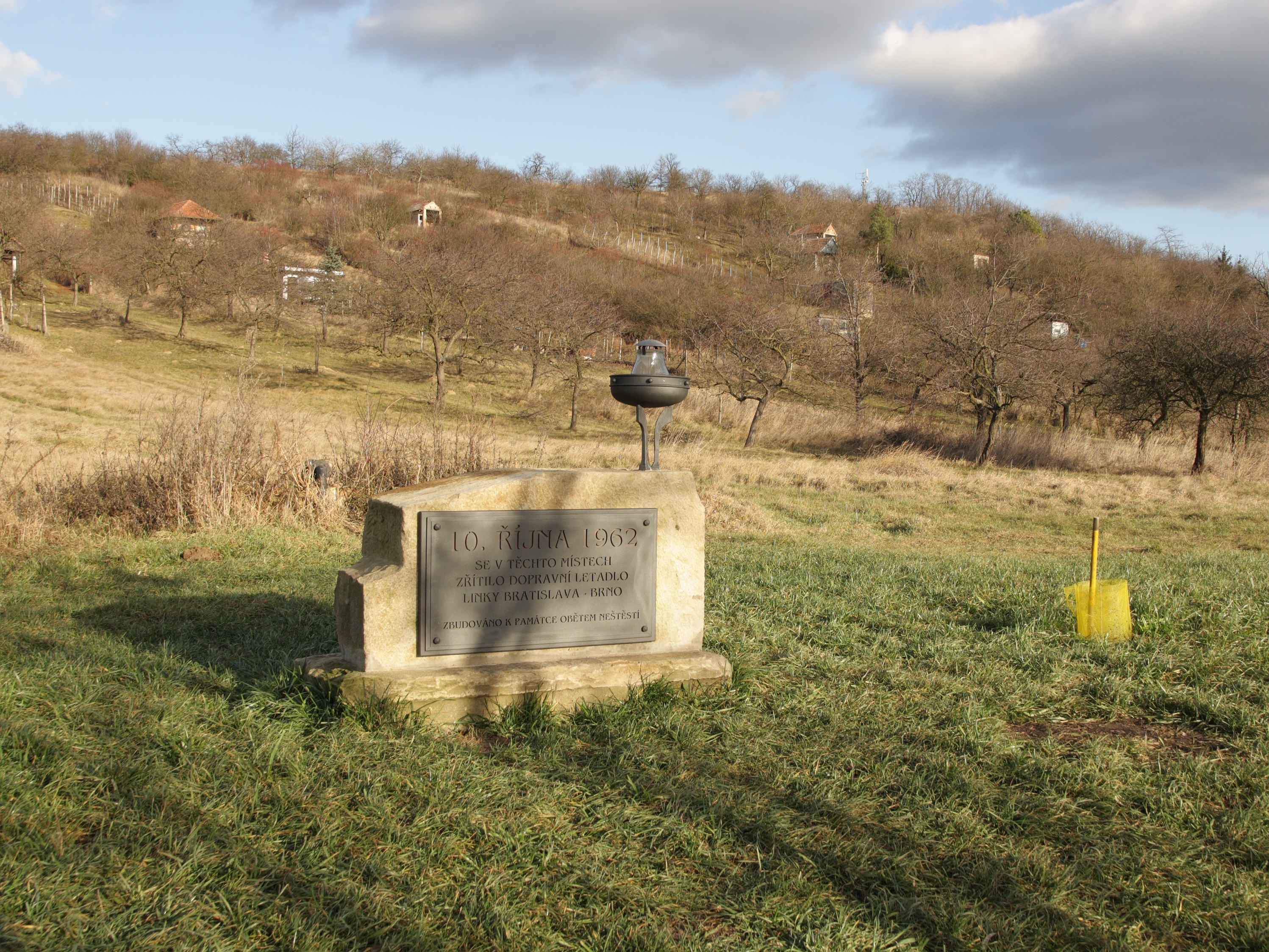 Újezd u Brna - pomník leteckého neštěstí pod Starou horou. Letoun ČSA Avia Av-14 (Il-14M) letěl ve středu 10. října 1962 na pravidelné lince OK 306 Košice-Bratislava-Brno-Praha. V 8:57 hod., v mlze, při nestandardním přiblížení na dráhu 28, narazil stroj OK-MCT pravým křídlem do úbočí kopce. Po nárazu se rozlomil a vznítil. Zahynulo 10 z 38 cestujících a 3 ze 4 členů posádky.